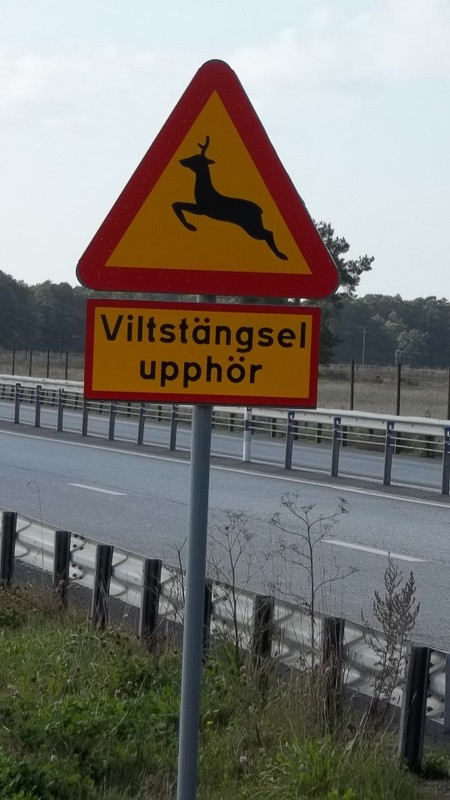 Placa sinalizando a presença de cercas direcionadoras para passagem de fauna sob a rodovia (wildlife underpass)